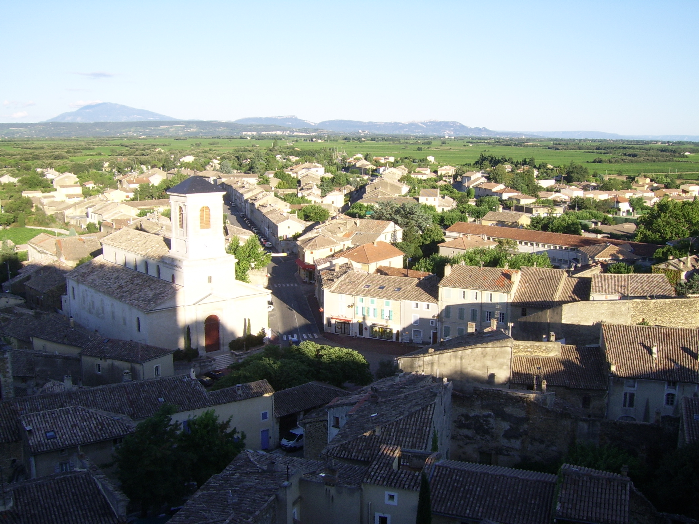 Vue de Suze-la-Rousse (Drôme, France), depuis le château. Au fond à gauche, le Mt Ventoux